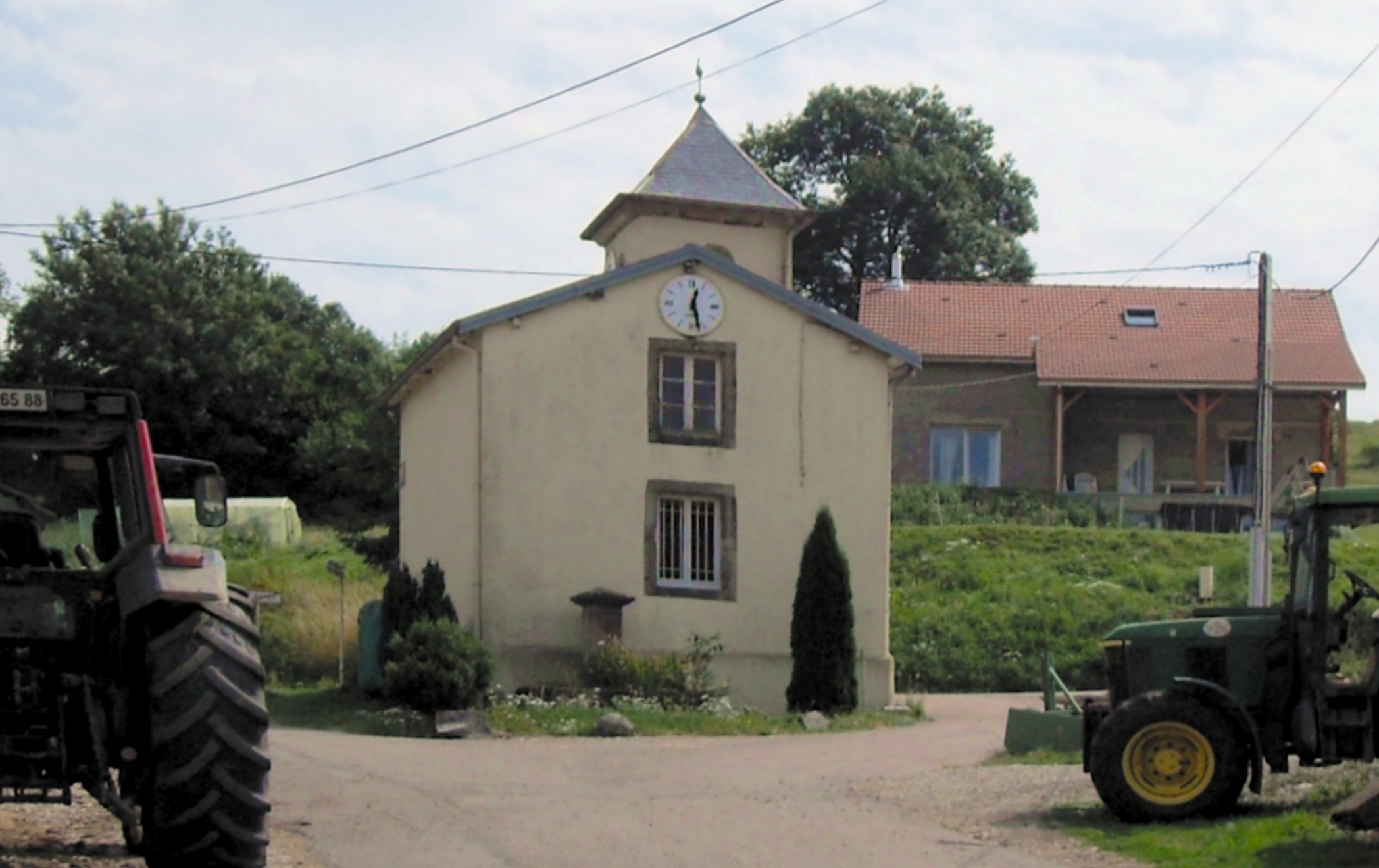 La mairie de Rapey